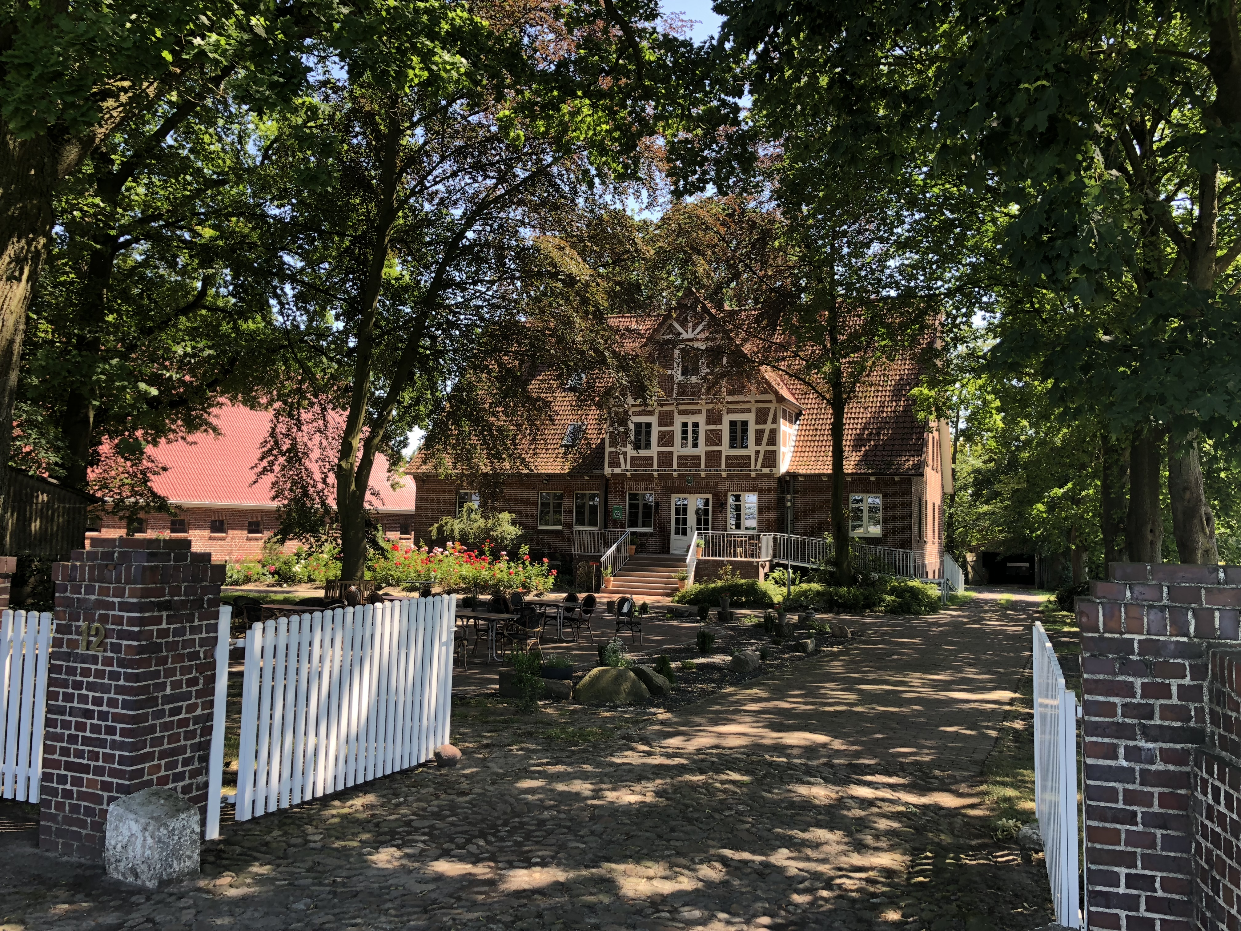 Buurnhuus in Bredenhoorn, Ekenhoff